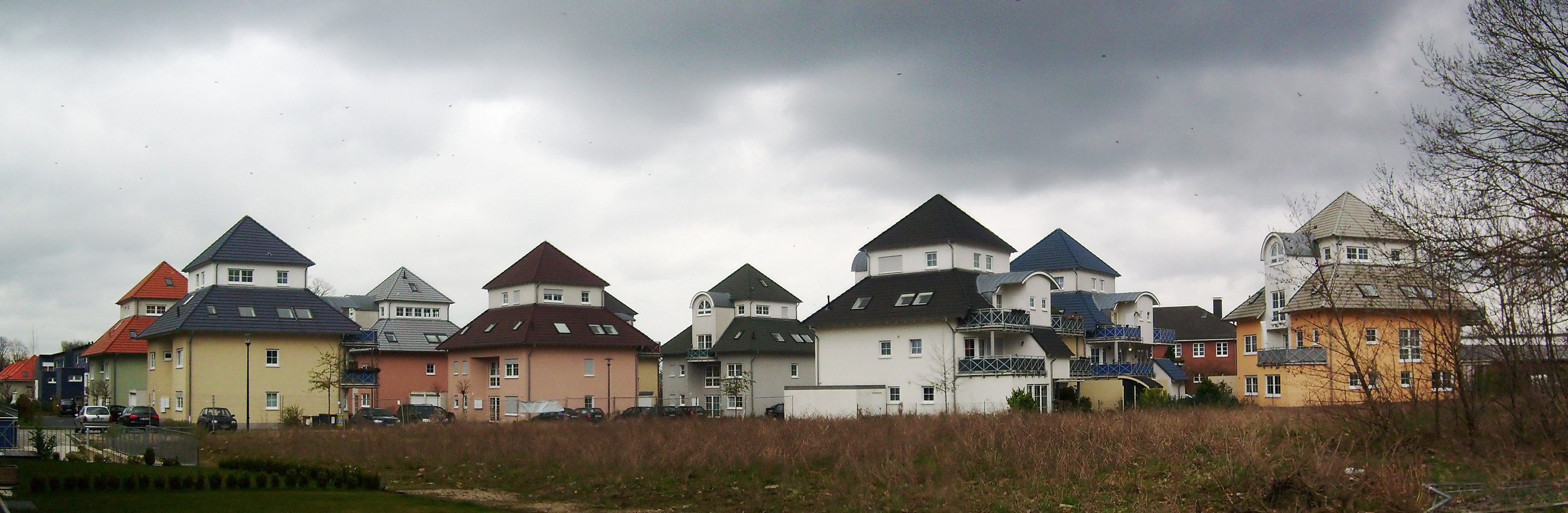 Wohnbebauung Dortmund Stadtkrone Ost